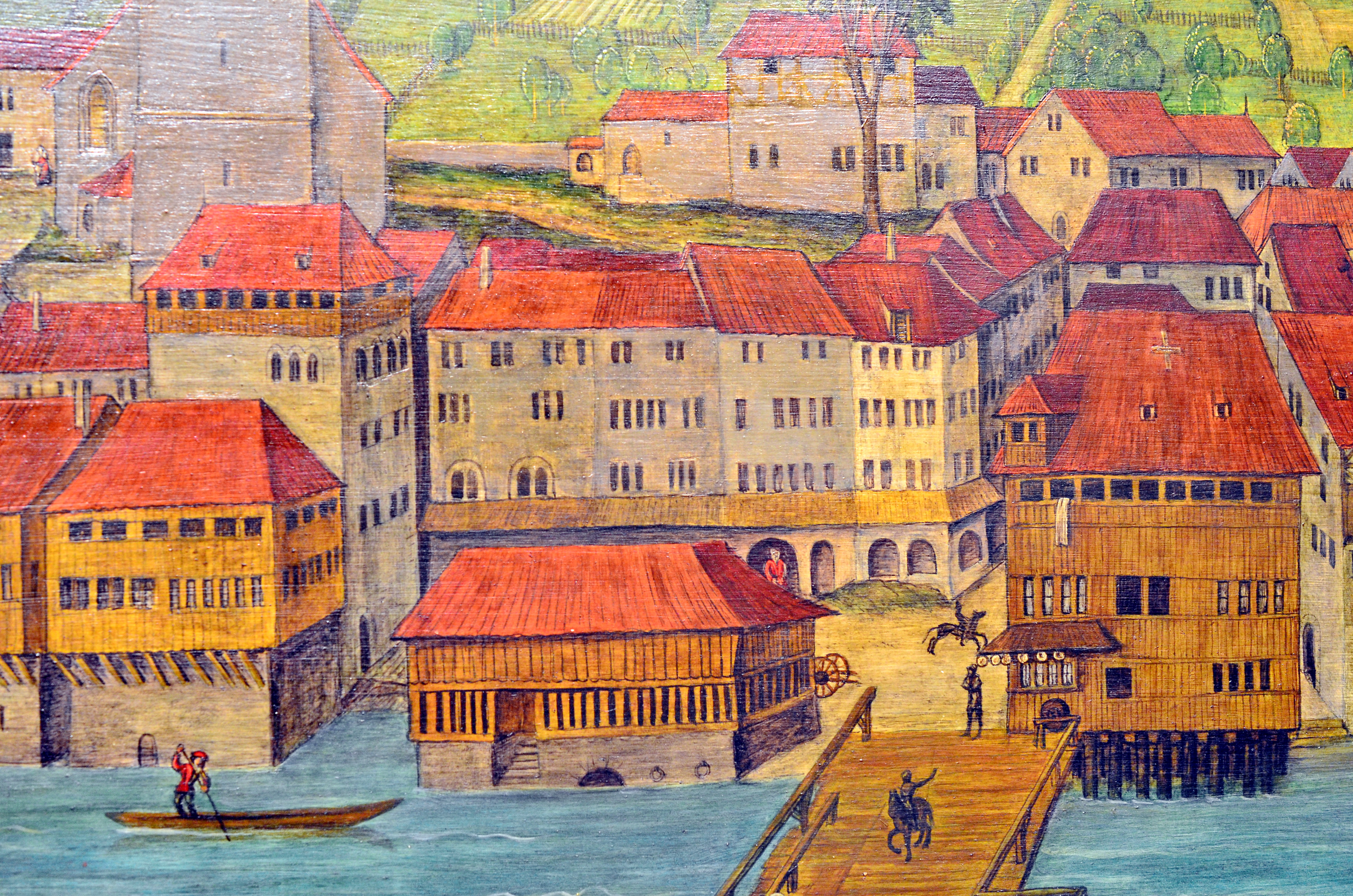 Der Weinplatz auf der Replik der Altartafeln von Hans Leu im Baugeschichtlichen Archiv der Stadt Zürich im Haus zum Rech. Die Panoramansicht des linksseitigen Limmatufers – 'Standort' der BetrachterIn ist wohl der Karlsturm des Grossmünsters – von Hans Leu d. Ä. gilt als die älteste zuverlässige Darstellung der Stadt Zürich, Ende des 15. Jahrhunderts auf den Altartafeln im Grossmünster mit viel Liebe zum Detail festgehalten. Die originalen Tafeln sind heute im Landesmuseum ausgestellt, eine (vermutlich) 1:1 Replik ist im Stadtarchiv öffentlich zugänglich.